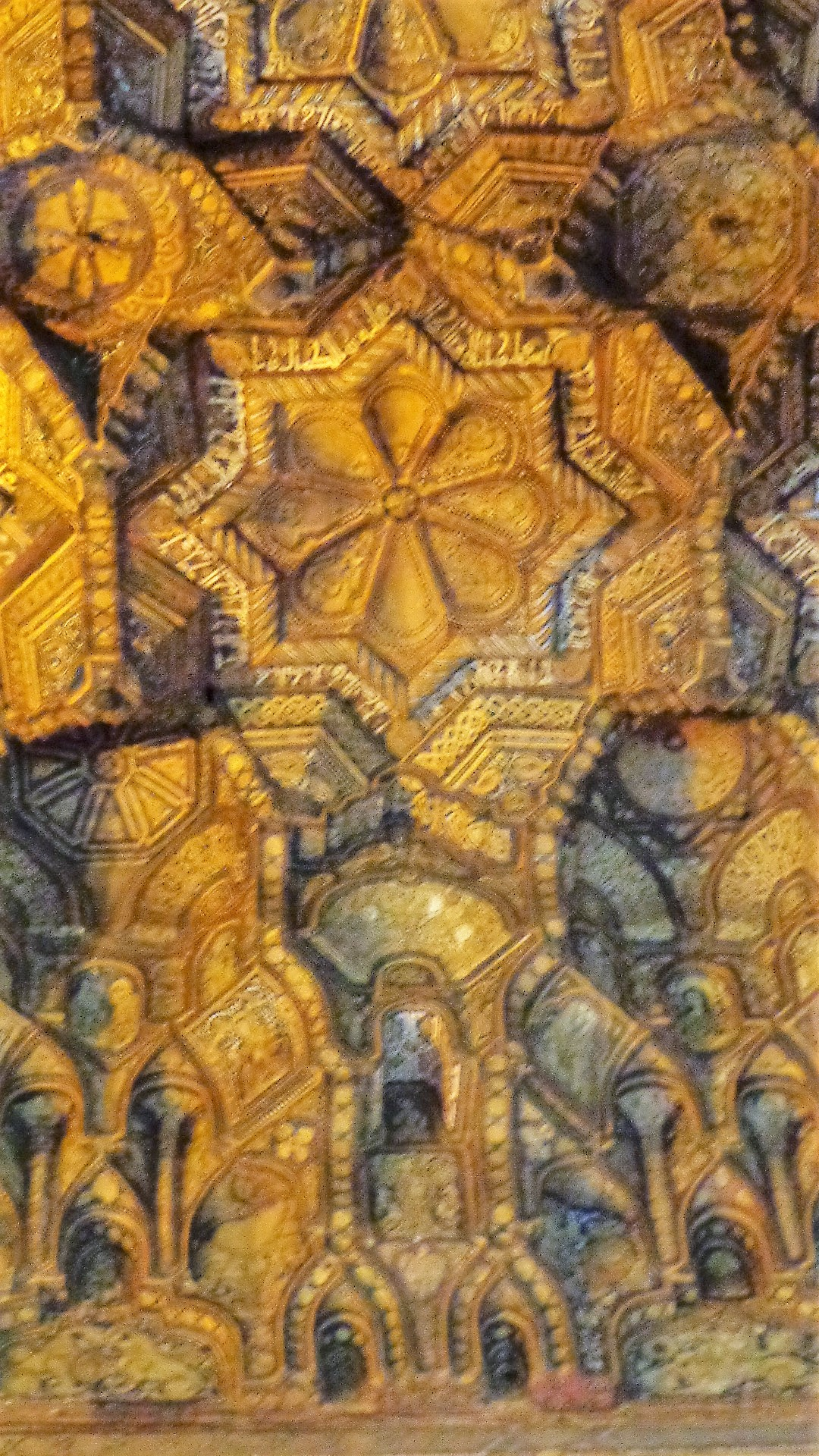 Tetto alveolare.